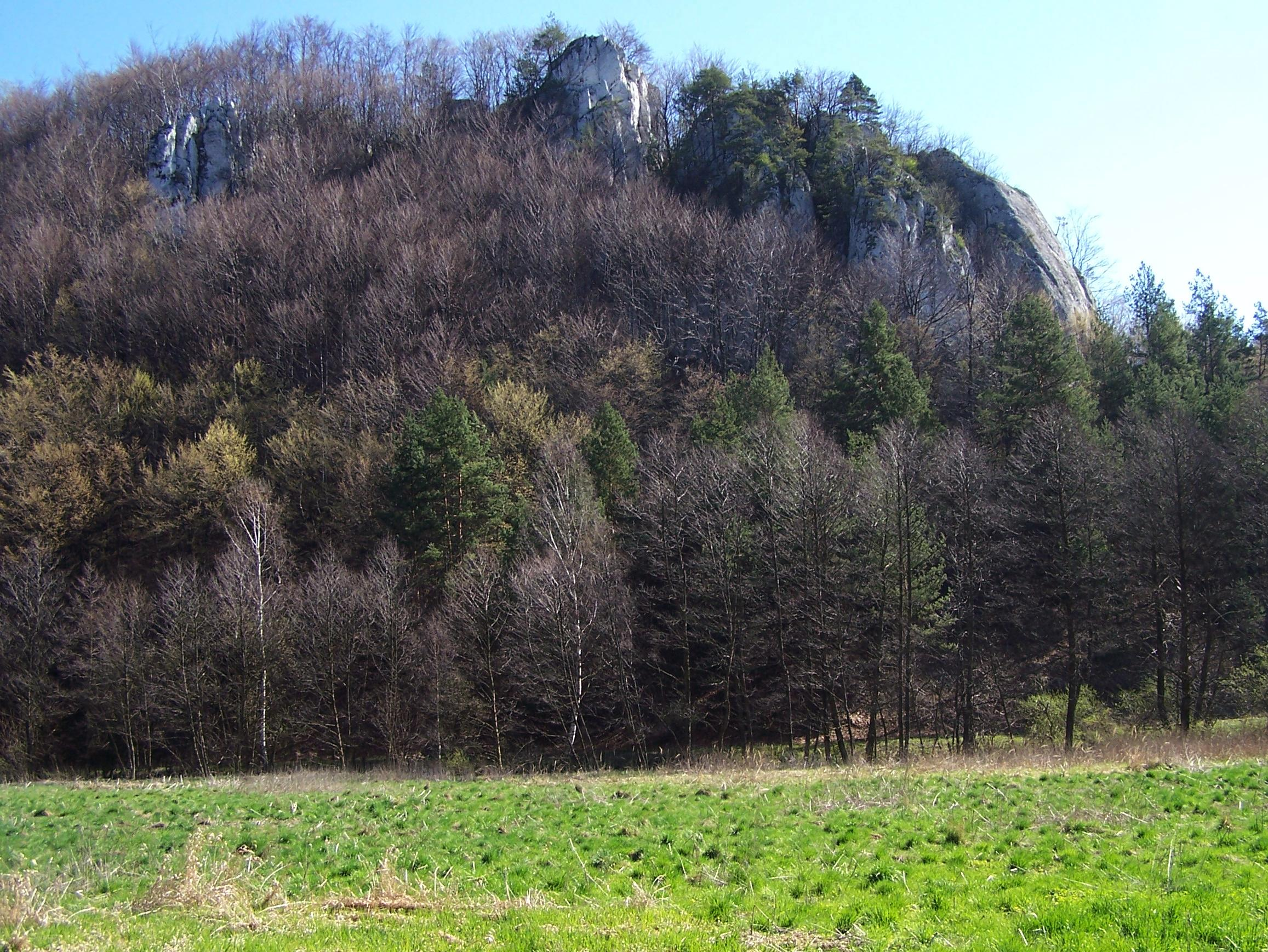 Dolina Będkowska (Park Krajobrazowy Dolinki Krakowskie)